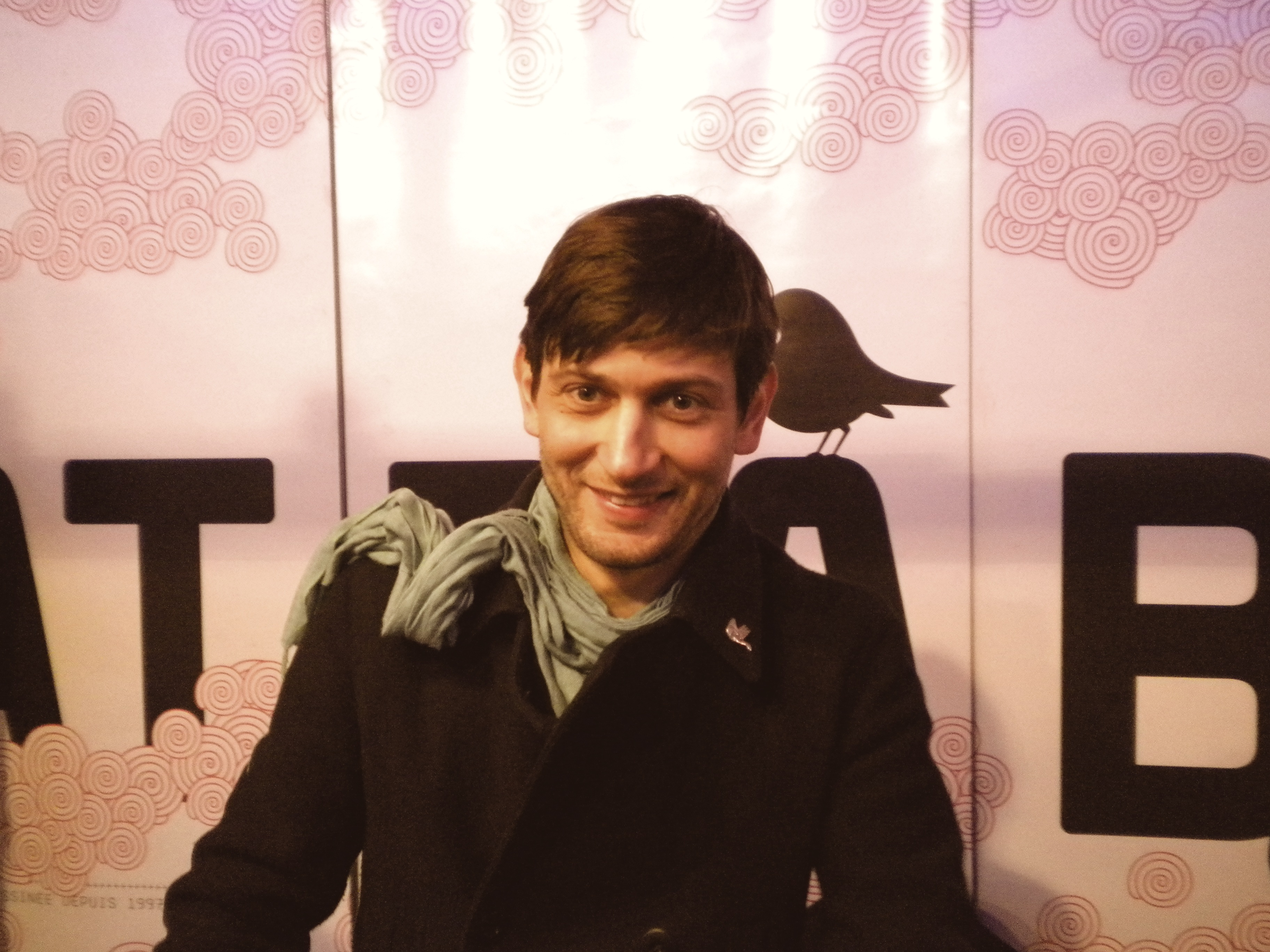 Ritratto di Manuele Fior ad Angouleme